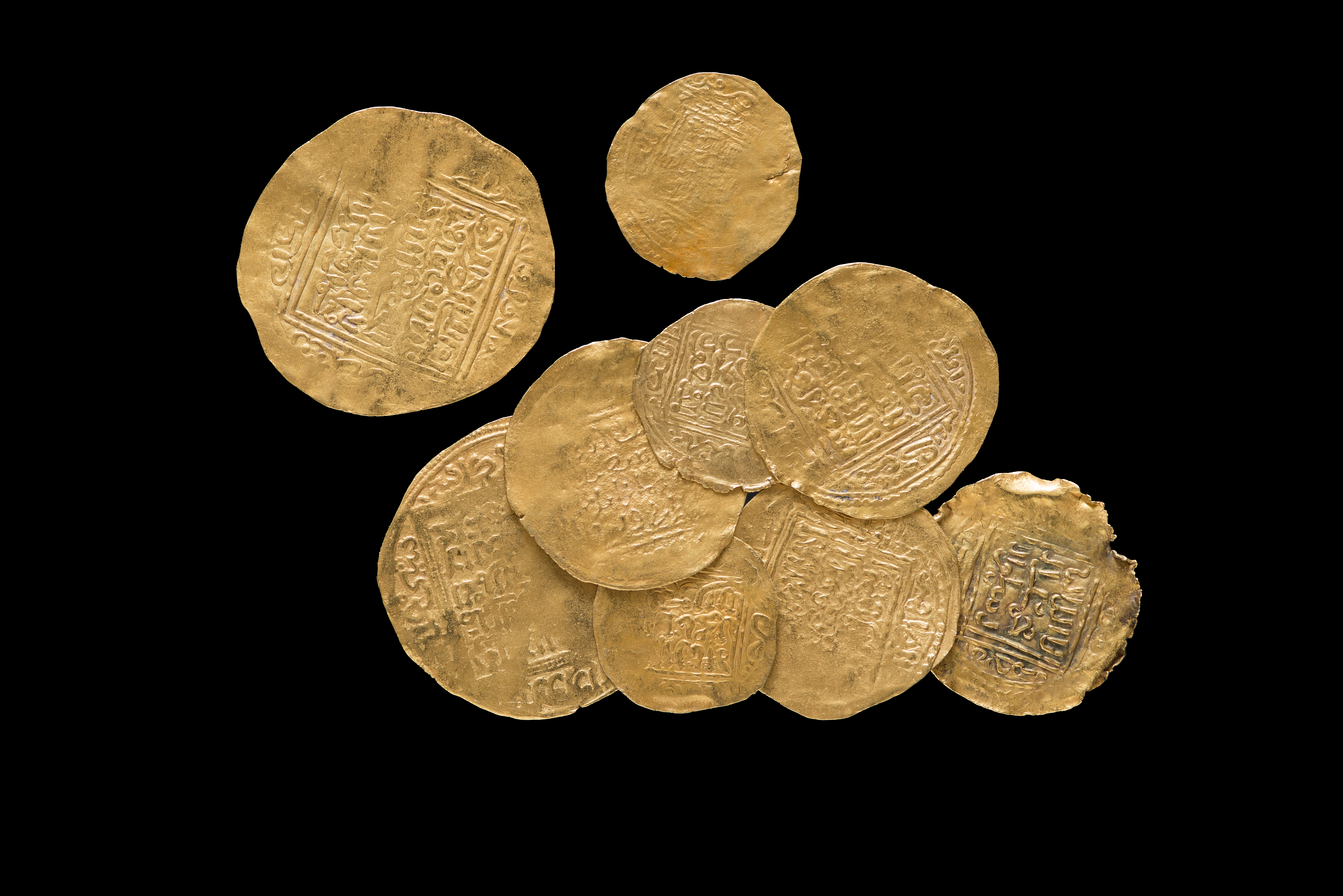 Münze aus dem Islamischen Kulturkreis, etwa 2. Hälfte des 15. Jahrhunderts, Münzsammlung der Islamische Numismatik der Universität Tübingen